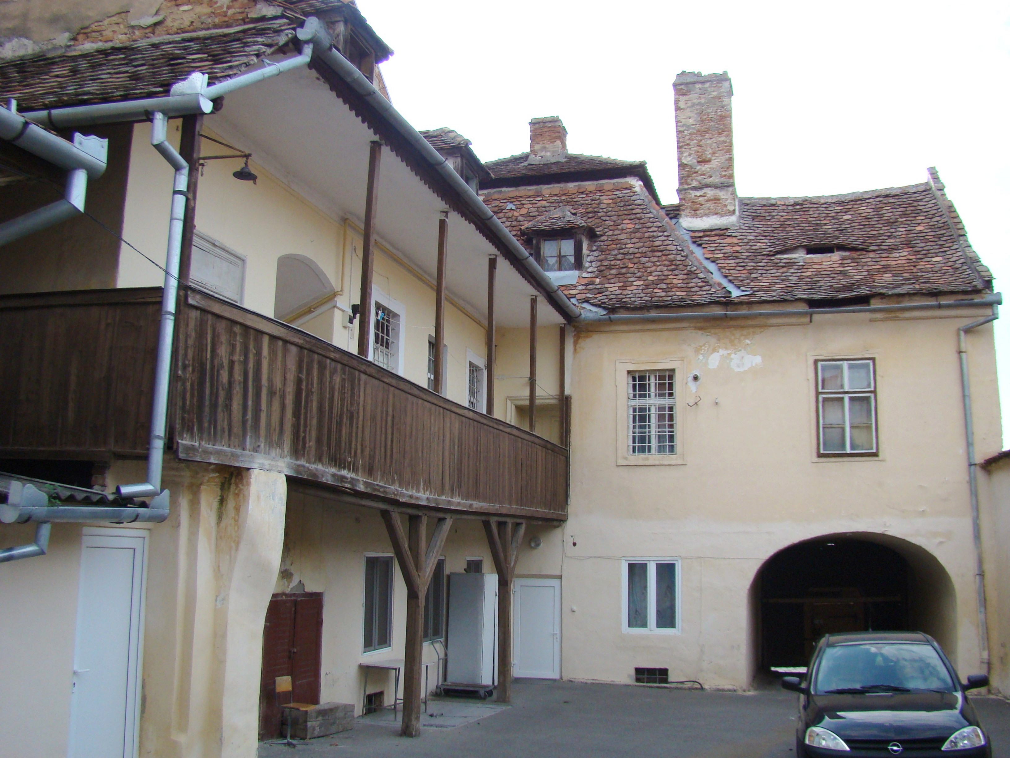 Ansamblul "Mitropolia Ortodoxă și Facultatea de Teologie Ortodoxă" 03